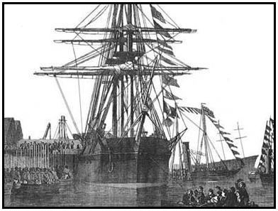 HMS Resolute